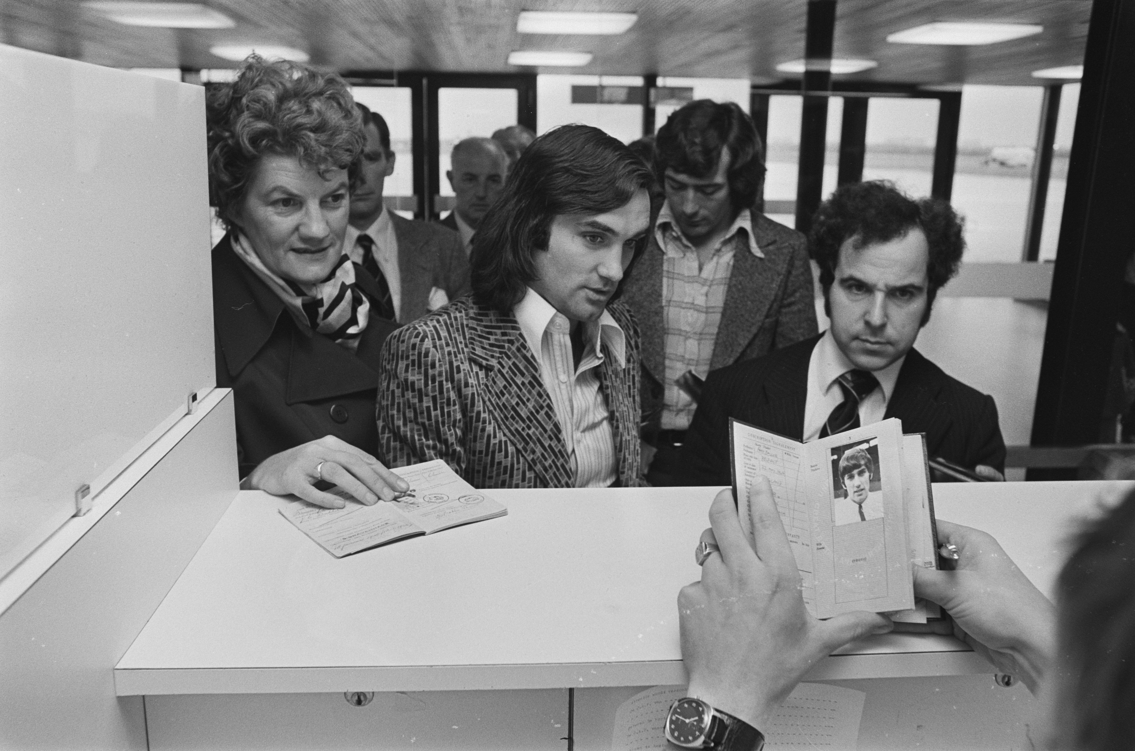 Collectie / Archief : Fotocollectie Anefo Reportage / Serie : [ onbekend ] Beschrijving : Aankomst Noordierse elftal op Zestienhoven; George Best bij de douane Datum : 12 oktober 1976 Trefwoorden : DOUANE, elftallen, sport, voetbal Persoonsnaam : George Best Fotograaf : Verhoeff, Bert / Anefo Auteursrechthebbende : Nationaal Archief Materiaalsoort : Negatief (zwart/wit) Nummer archiefinventaris : bekijk toegang 2.24.01.05 Bestanddeelnummer : 928-8252